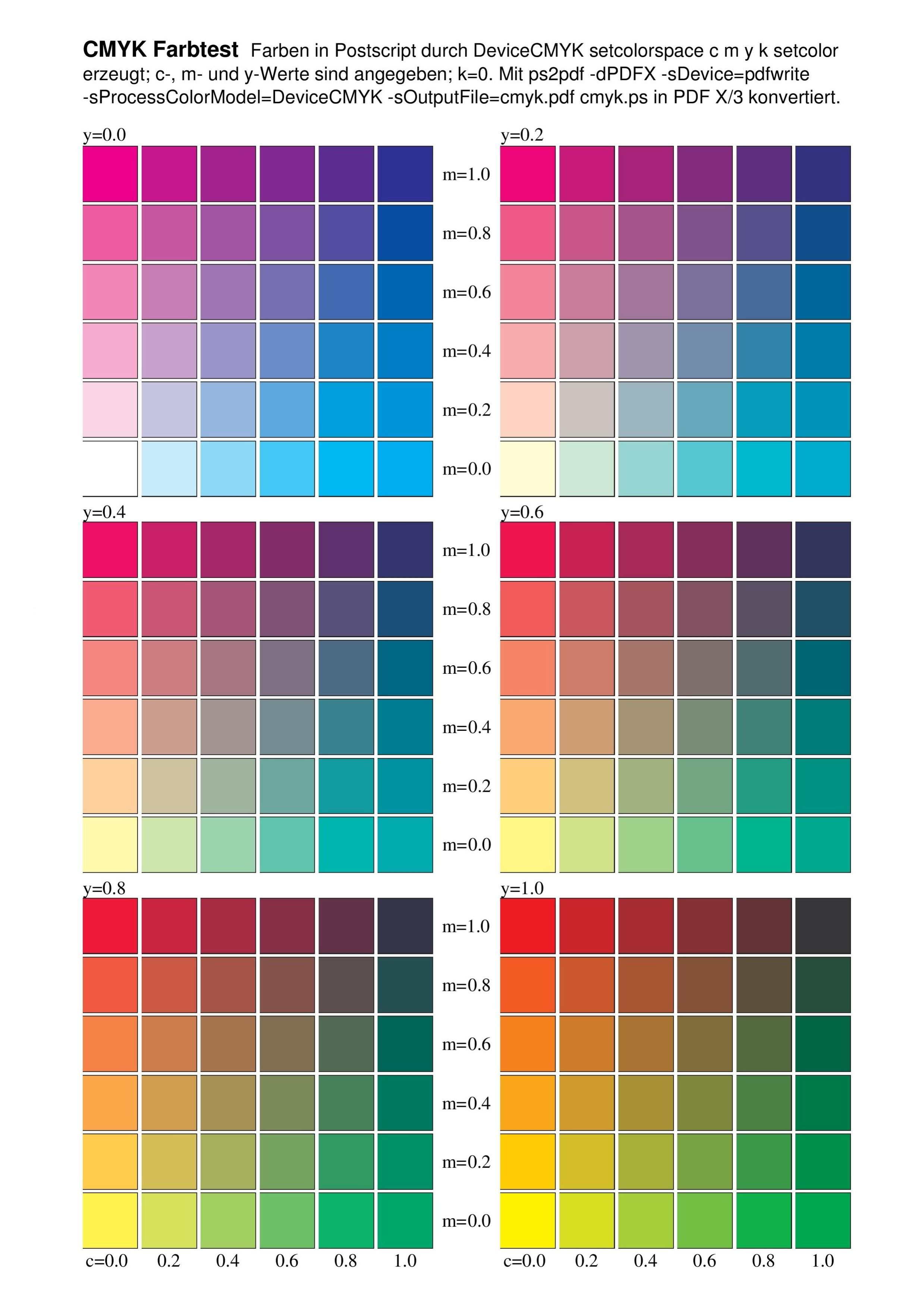 FarbTest Datei im PDF X/3 Standard. Definiert werden 216 Farben im CMYK-Farbmodell. Erlaubt reproduzierbaren Farben bei Ausdrucken.